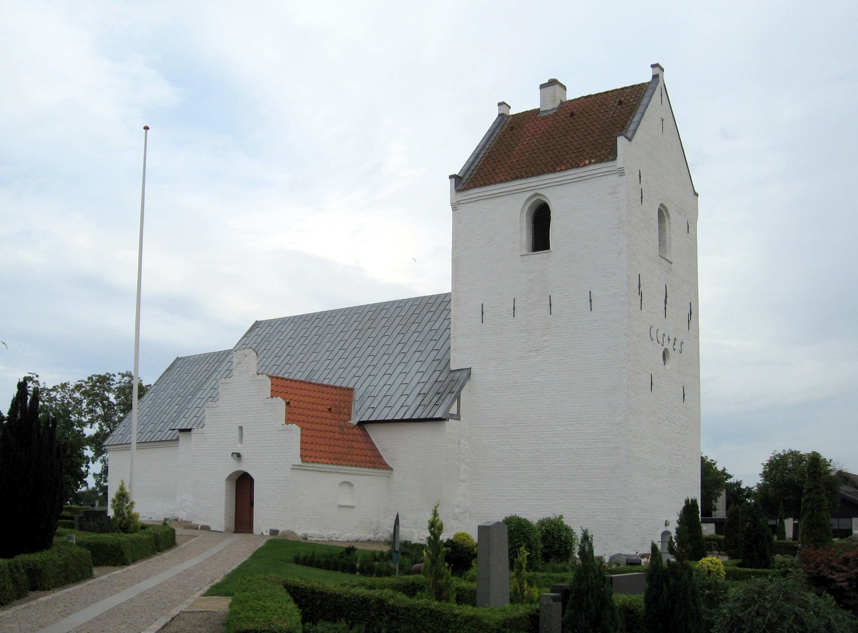 Storvorde Kirke